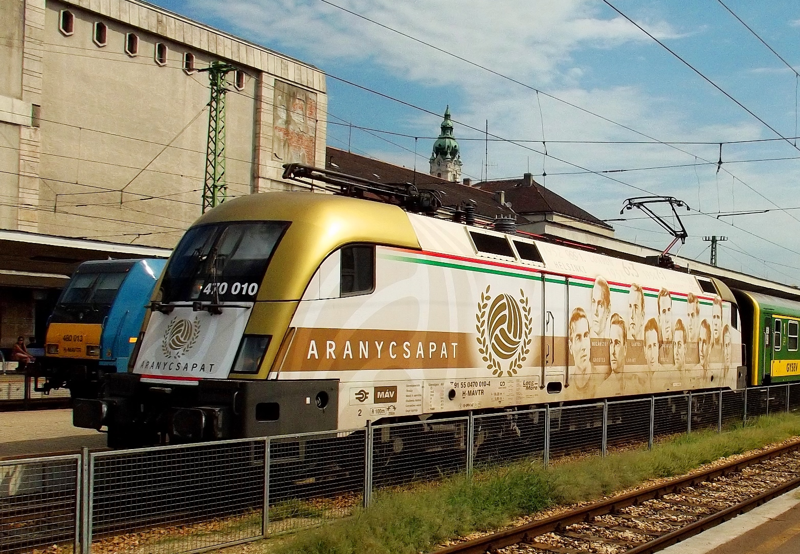 Aranycsapat Taurus